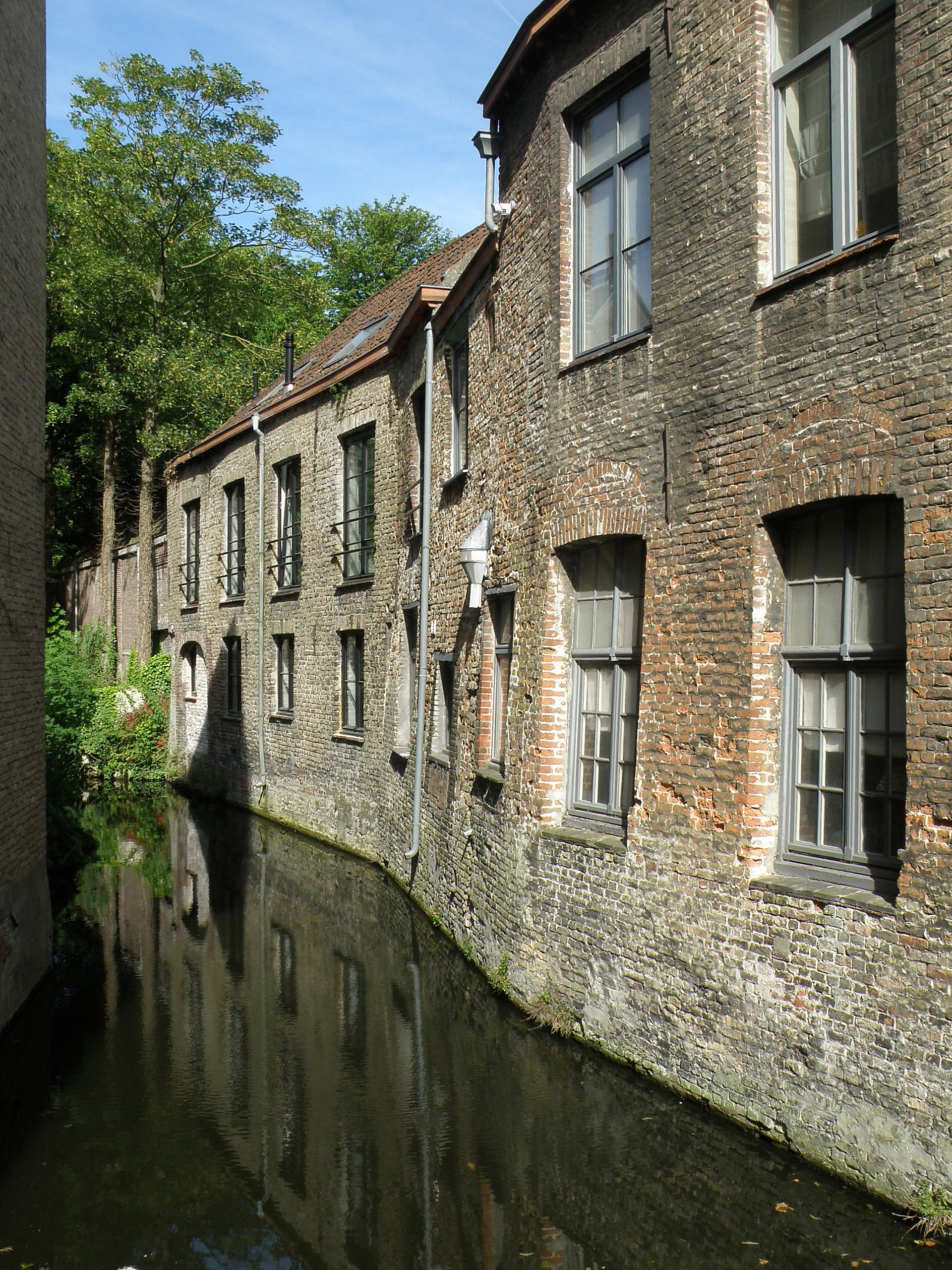 Brugge. Eekhoutrei, gezien vanop de Groeninge (blikrichting noord-oost).